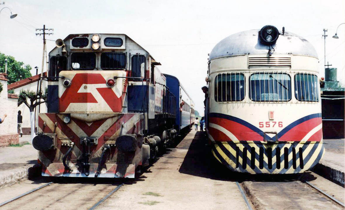 Cruzada de trenes en el ramal Merlo-Lobos del Ferrocarril Sarmiento en estación Marcos Paz, provincia de Buenos Aires.7613-CMU 5576 Marcos Paz